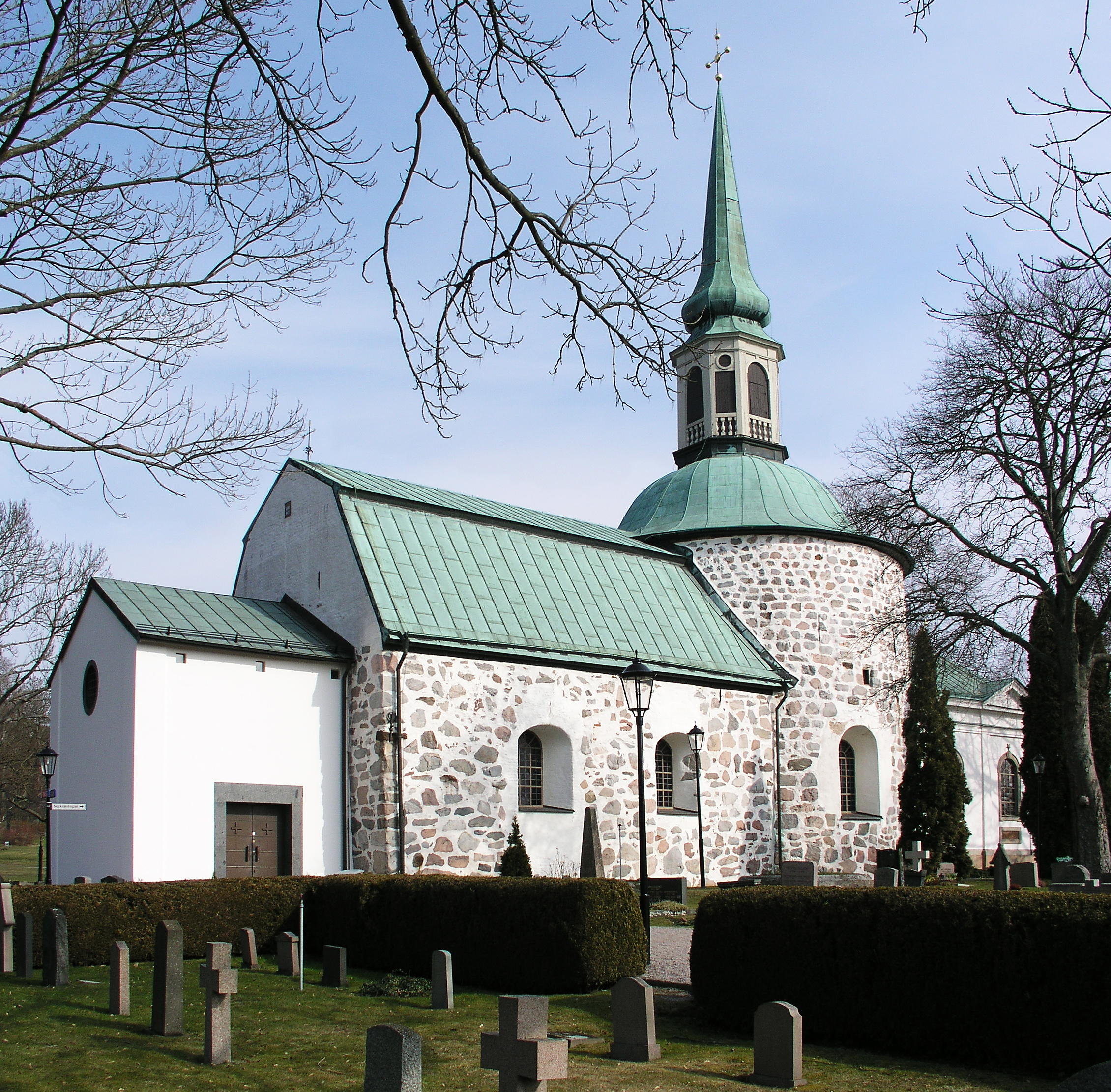 Bromma kyrka/church, Diocese of Stockholm, Sweden.